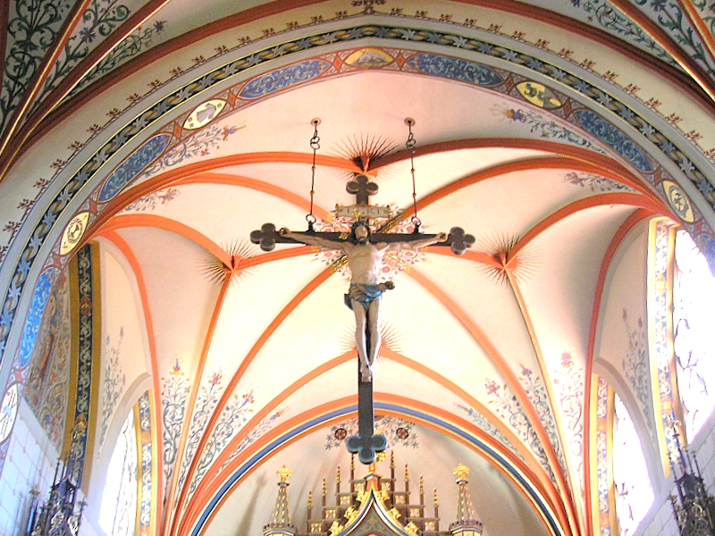 Pfarrkirche St. Anna (Waal bei Landsberg am Lech, Landkreis Ostallgäu, Bayerisch-Schwaben). Blick ins Chorgewölbe. Eigene Aufnahme, Juli 2007 / Parish church St. Anne (Waal near Landsberg am Lech, Bavaria, Germany). The vaulting of the choir. Own photo, July 2007